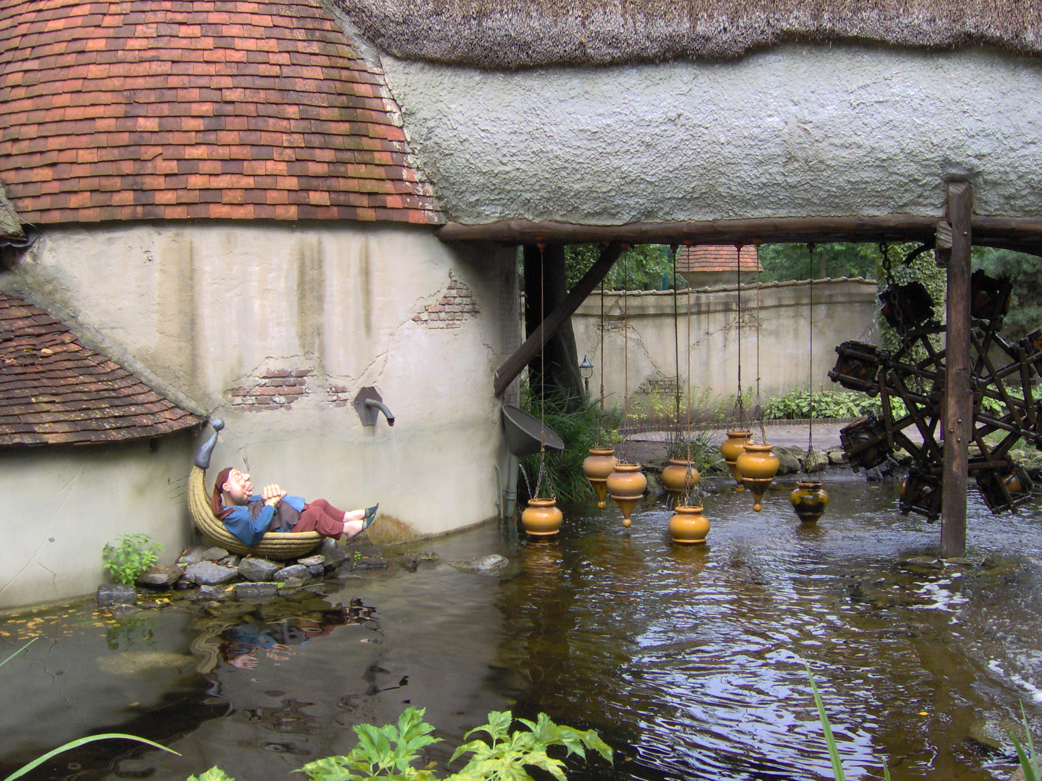 Lal's Brouwhuys.